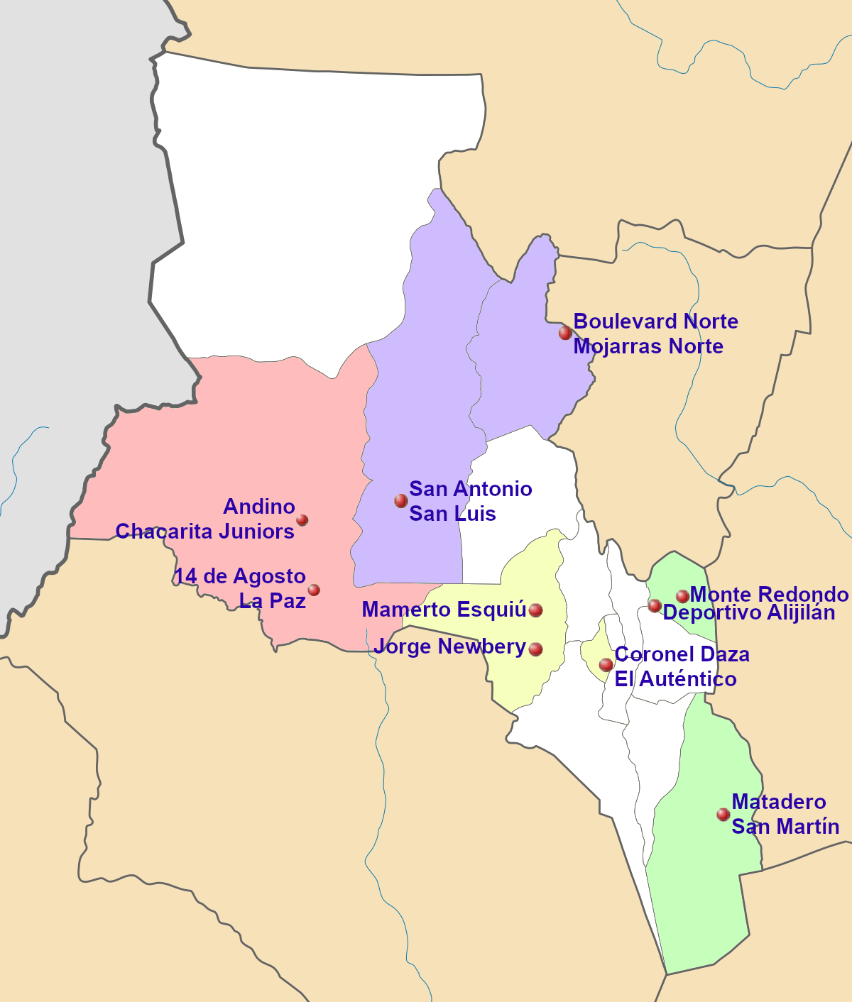 Mapa definitivo de los 16 equipos participantes de la edición 2020 del Torneo Provincial de Fútbol de Catamarca.